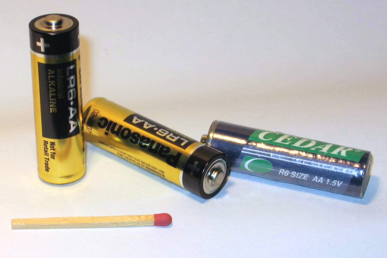 size R-6 disposable batteries